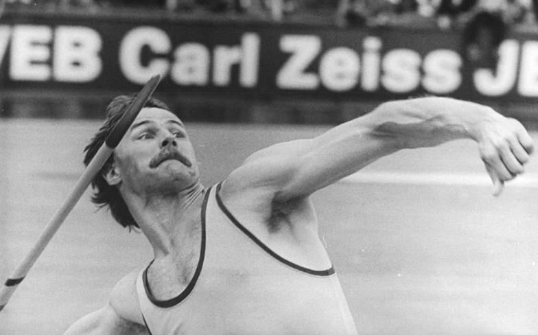 Gerald Weiß ADN-ZB Kluge 4.6.88 Jena: Leichtathletik-Olympia-Qualifikation- Gerald Weiß (SC Traktor Schwerin) gewann das Speerwerfen mit der persönlichen Bestleistung von 83,30 m.